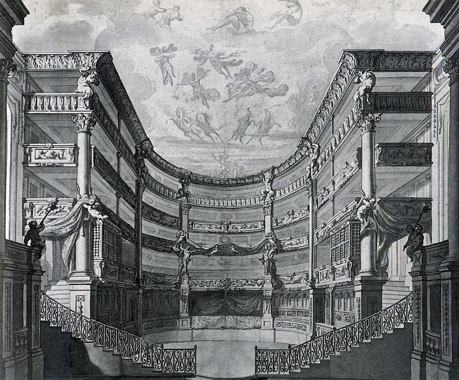 Zuschauerraum des Opernhauses am Taschenberg in Dresden nach seinem Umbau 1691